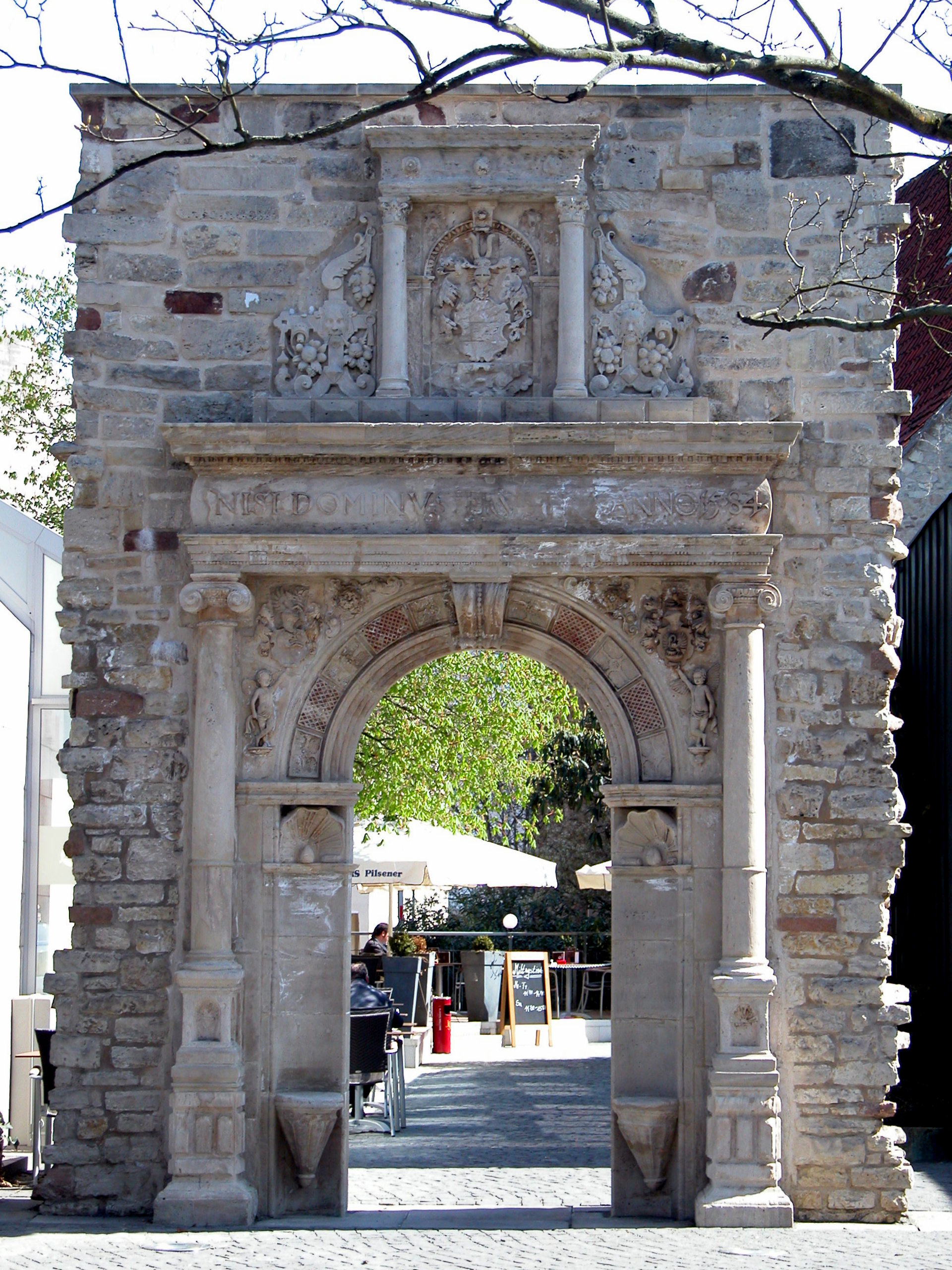 Braunschweig, Gördelingerstraße 43: Portal des Hauses der Eheleute Hilmar von Strombeck und Katharina Schrader aus dem Jahre 1584 von Westen gesehen.